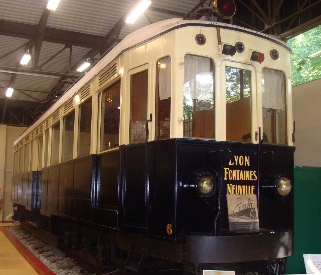 La motrice n°6 du train bleu conservée au musée Henri-Malartre à Rochetaillée (Rhône).